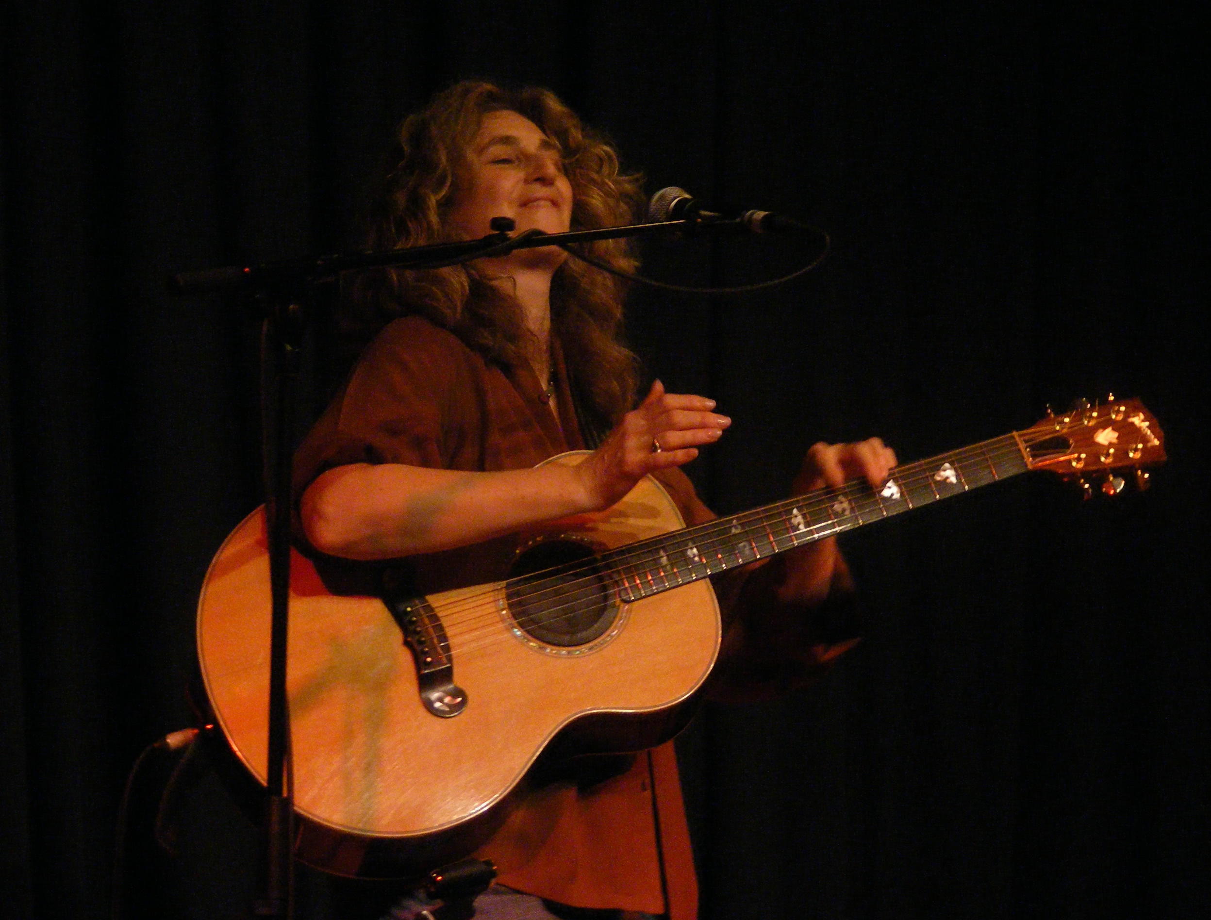 Vicki Genfan bei der Veranstaltung "Women, Strings & Voices" in Neunkirchen (Saar) am 4. April 2009.